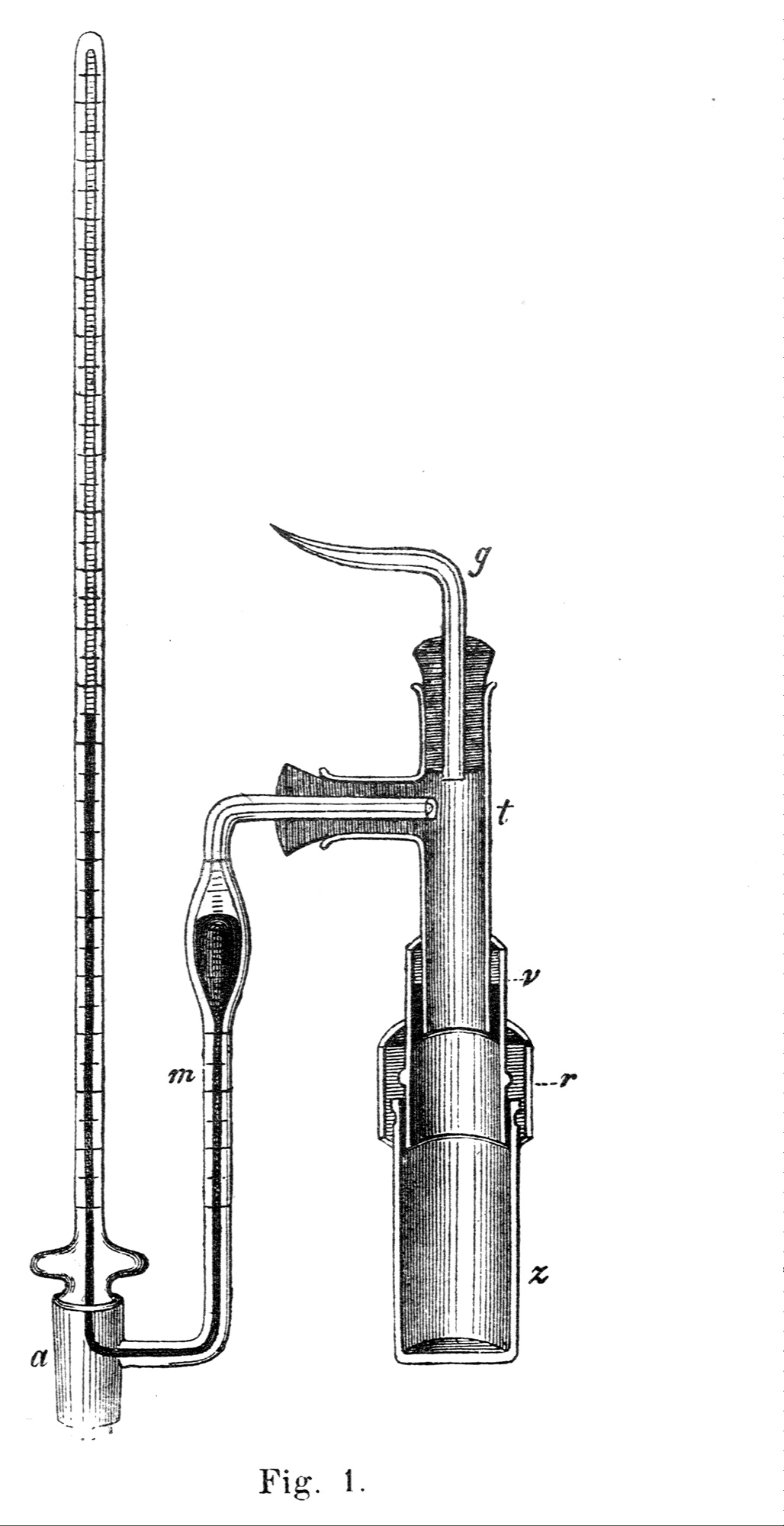 Pfeffersche Zelle (engl. Pfeffer Cell) Schematics